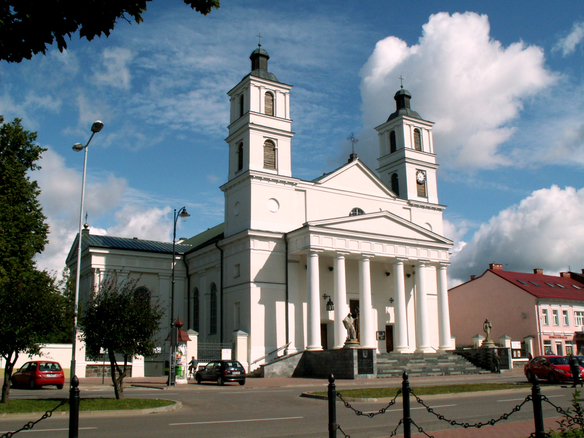 Suwałki - kościół św. Aleksandra (zabytek nr 6 z 8.02.1979)